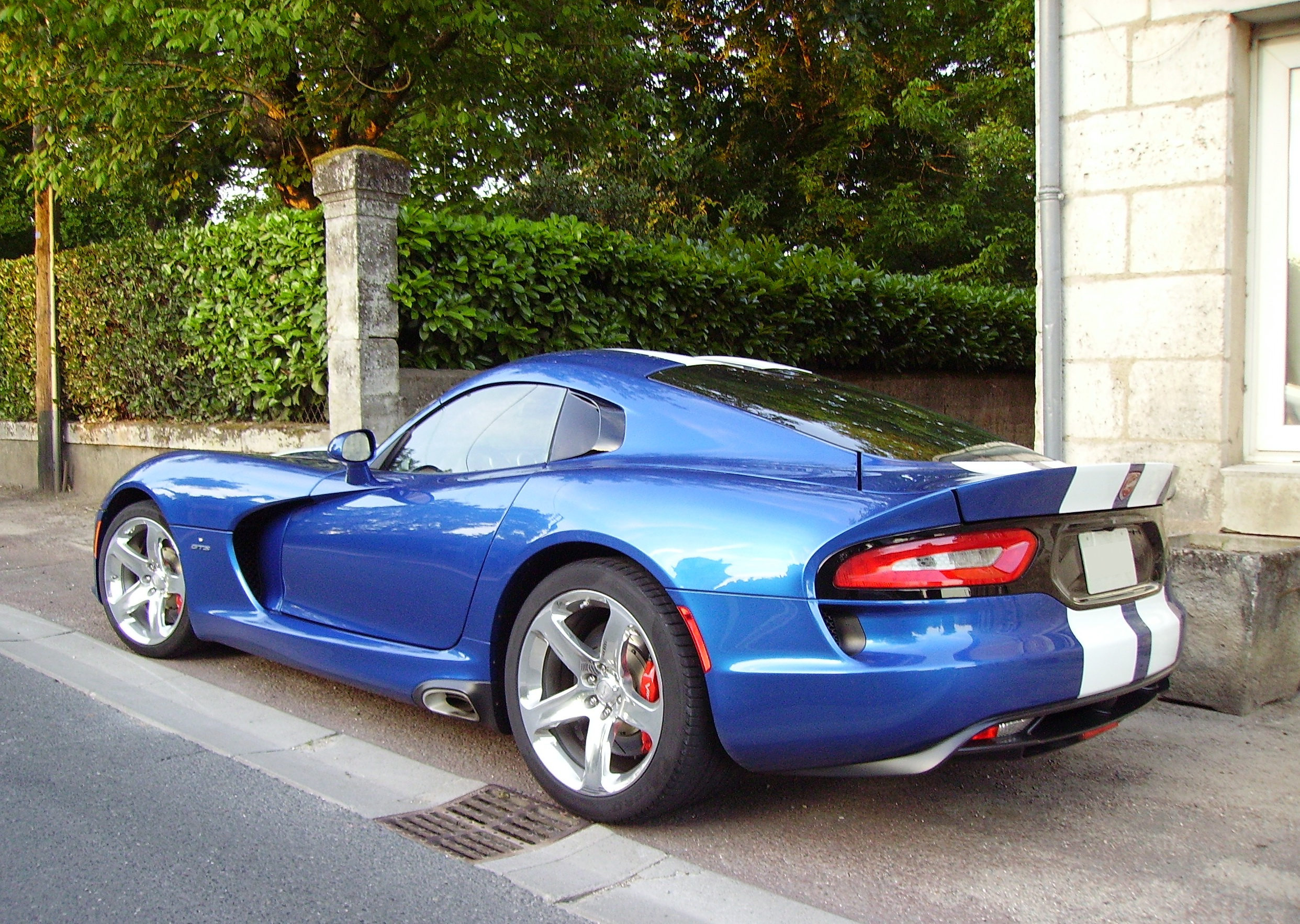 SRT Viper GTS, bleu/blanc.